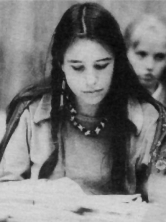 Winona LaDuke. Aufgenommen in den 70ern bei einer öffentlichen Veranstaltung in Deutschland oder der Schweiz. Das Bild stammt aus einer meiner alten Fotokisten. Genaueres weiß ich leider nicht mehr.